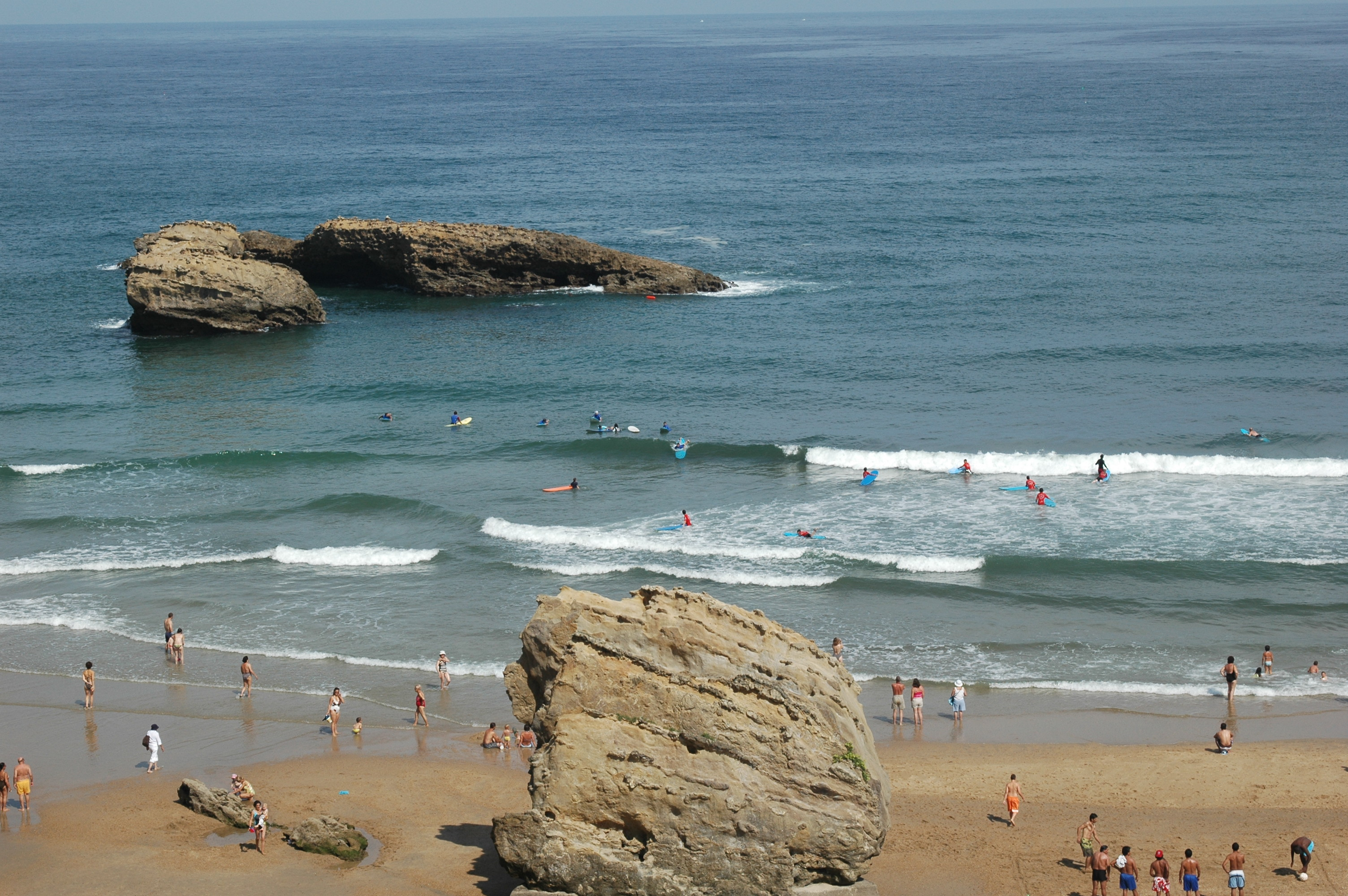 Biarritz, les surfeurs sur la Grandplage. Photo prise le 06/08/06 par Harrieta171